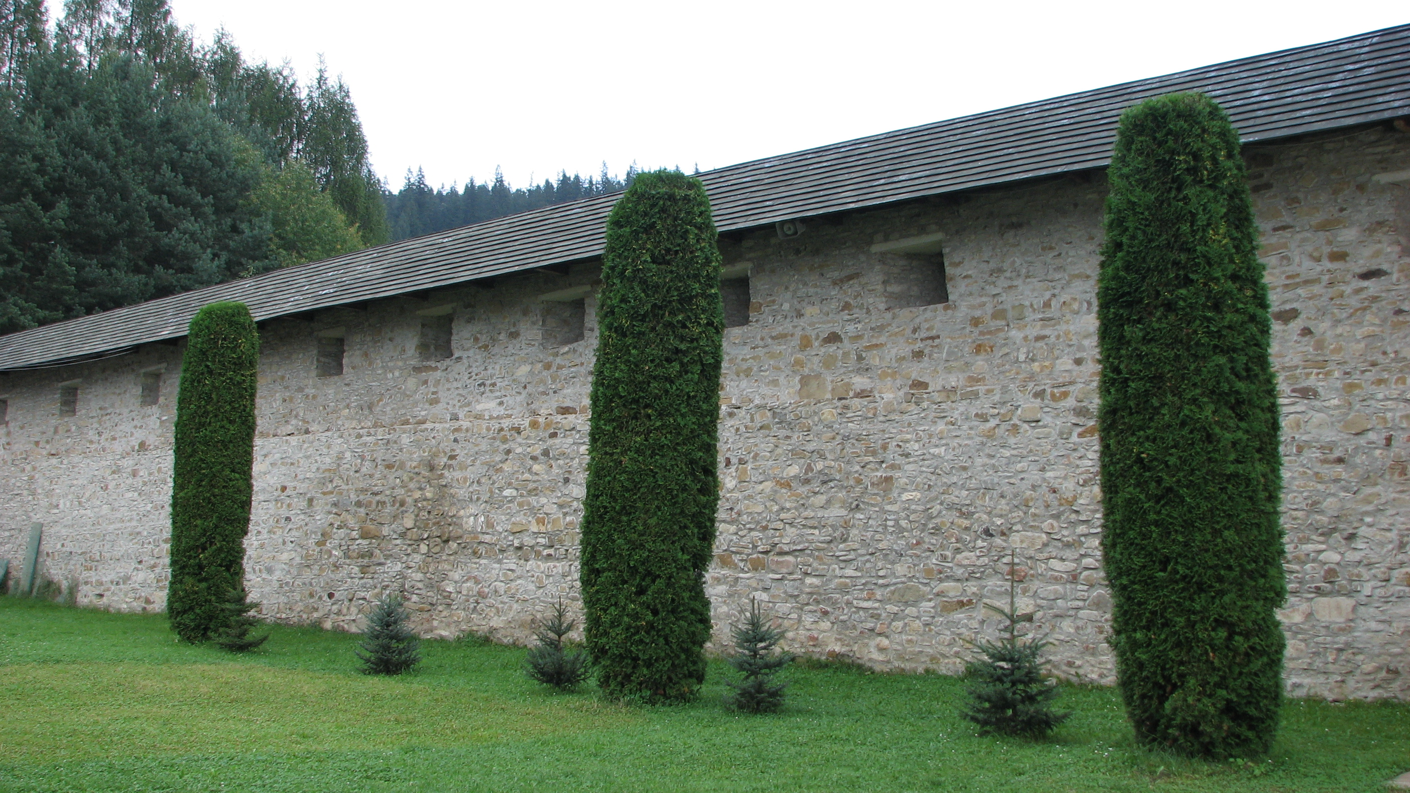 Mănăstirea Putna - Bucovina - România